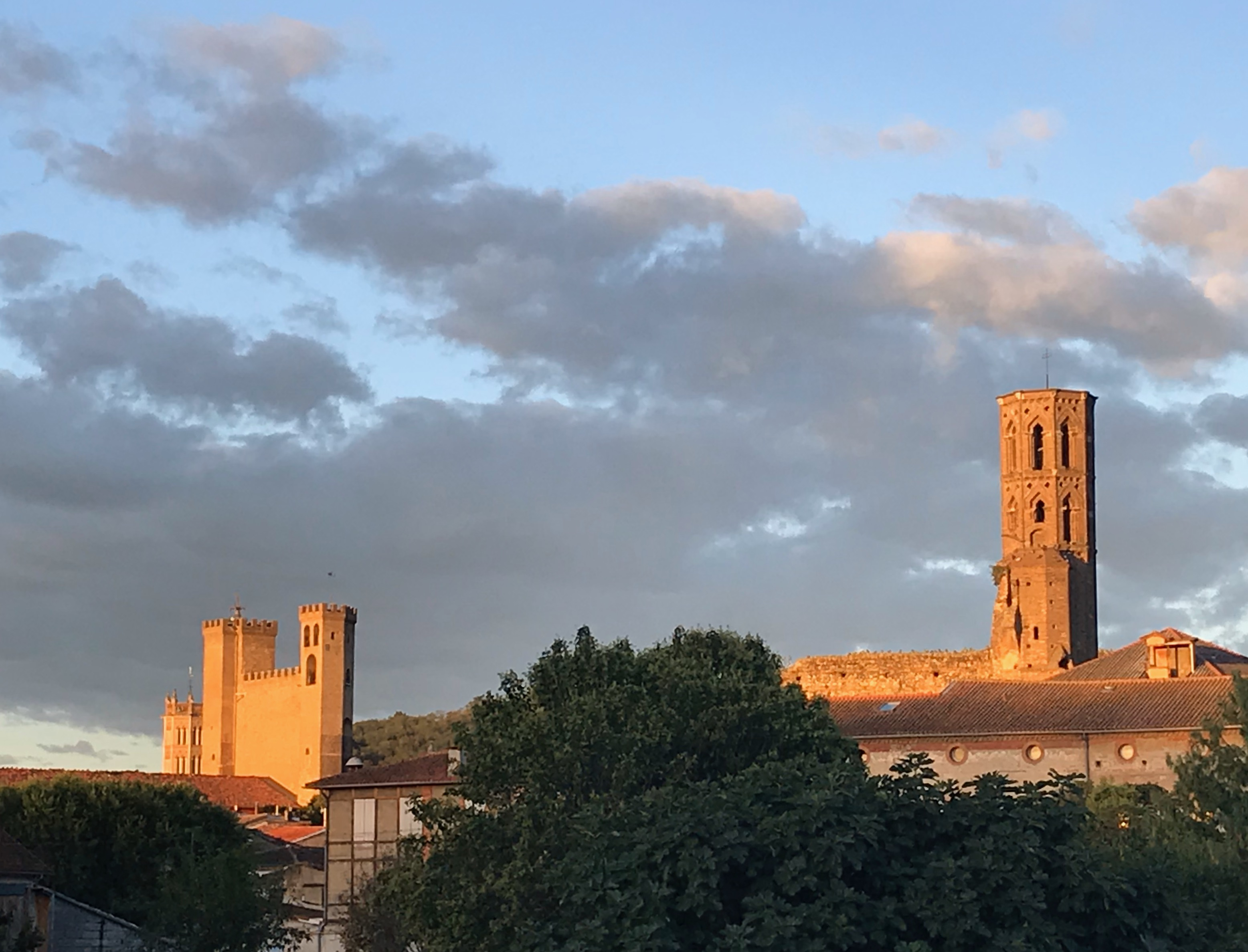 Les trois clochers de Pamiers au lever du soleil